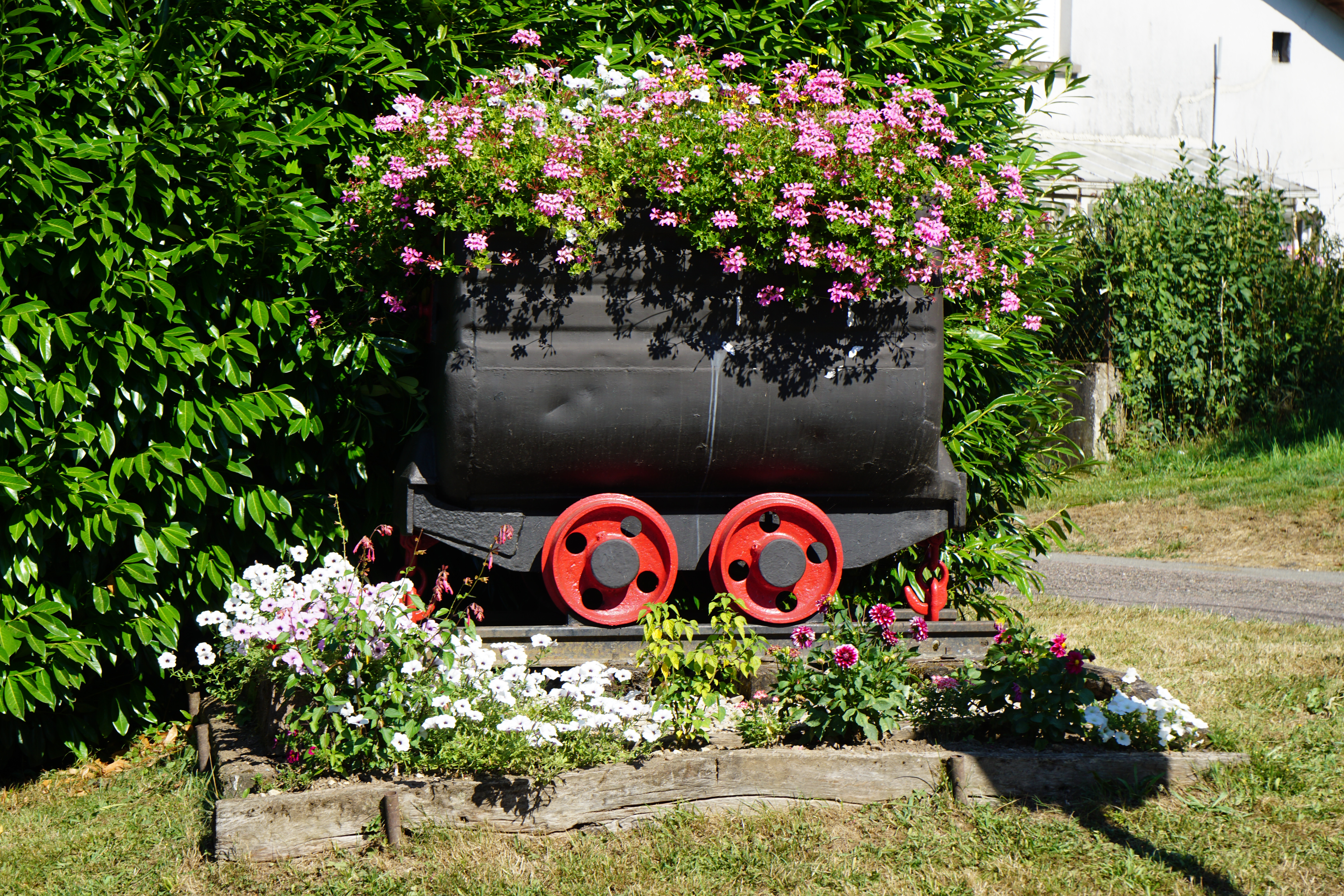 Une berline installé à Clairegoutte pour rendre hommage aux mineurs du village qui ont travailler dans les houillères de Ronchamp.